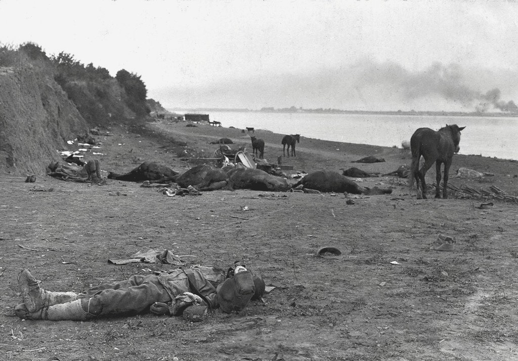 1916 Victime din Armata Bulgară în bătălia de la Turtucaia